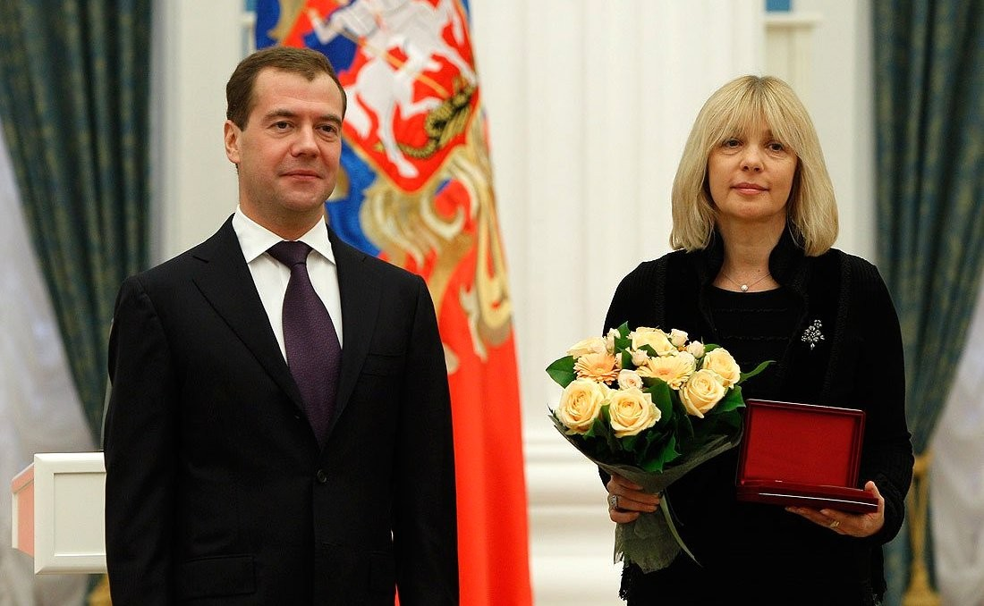 Вера Глаголева во время присвоения звания «Народный артист Российской Федерации»